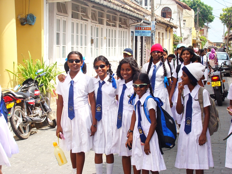 Sinhalesische Schulmädchen in der Stadt Galle